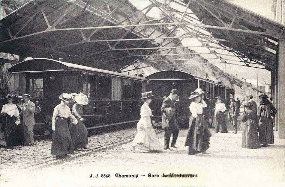 Chamonix - Intérieur de la gare du Montenvers.